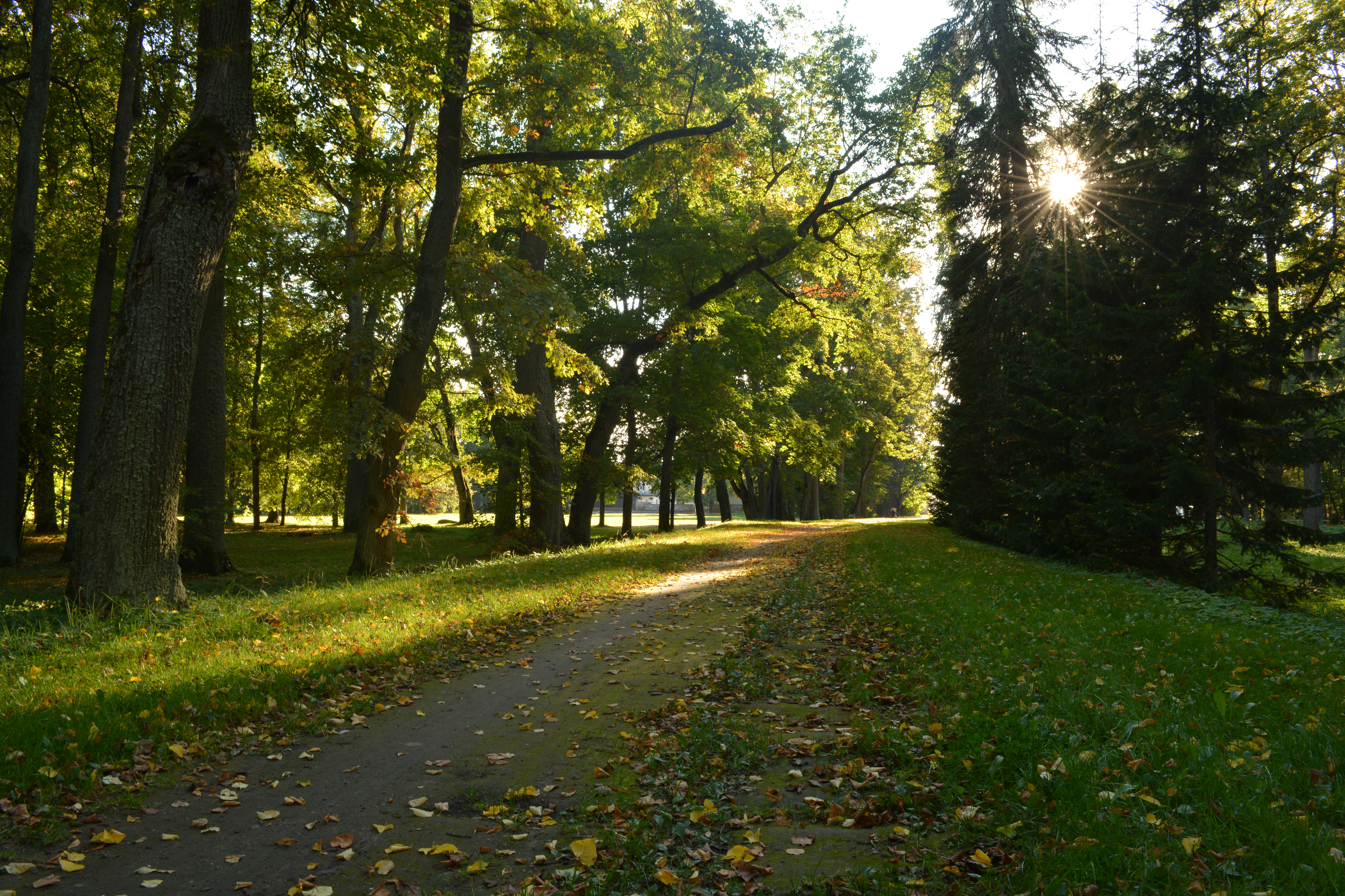 Luunja mõisa park